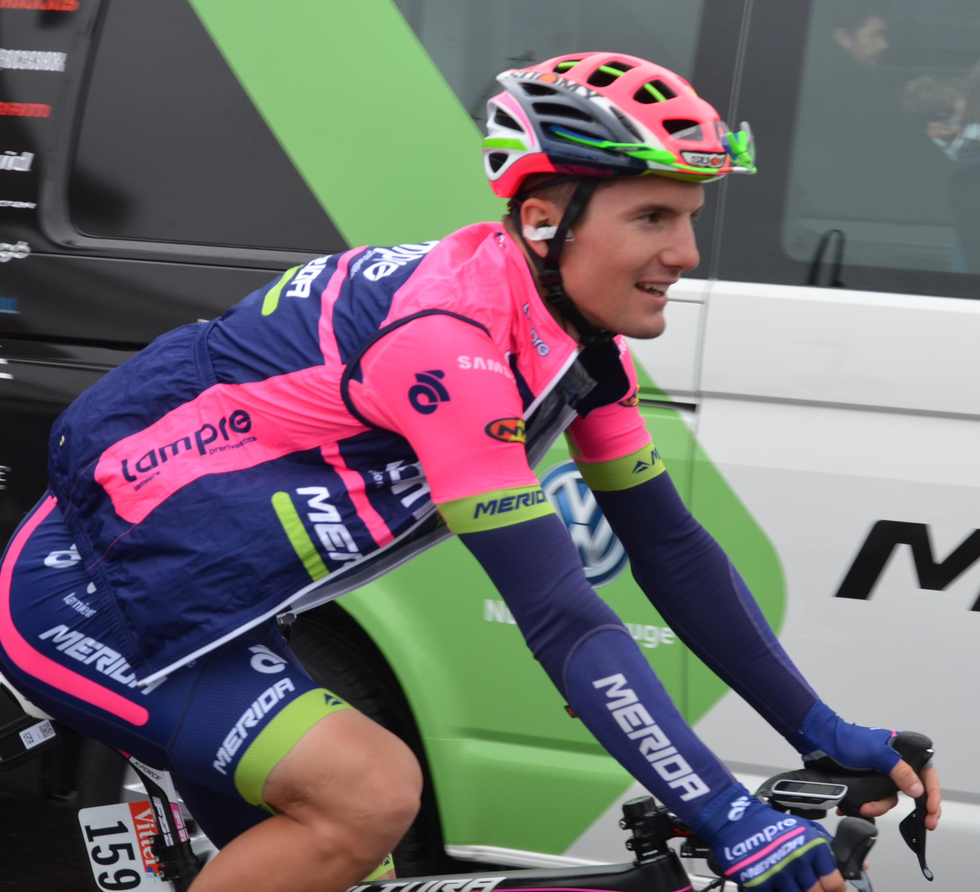 Jan Polanc au départ de la 2e étape du Tour de France 2016.